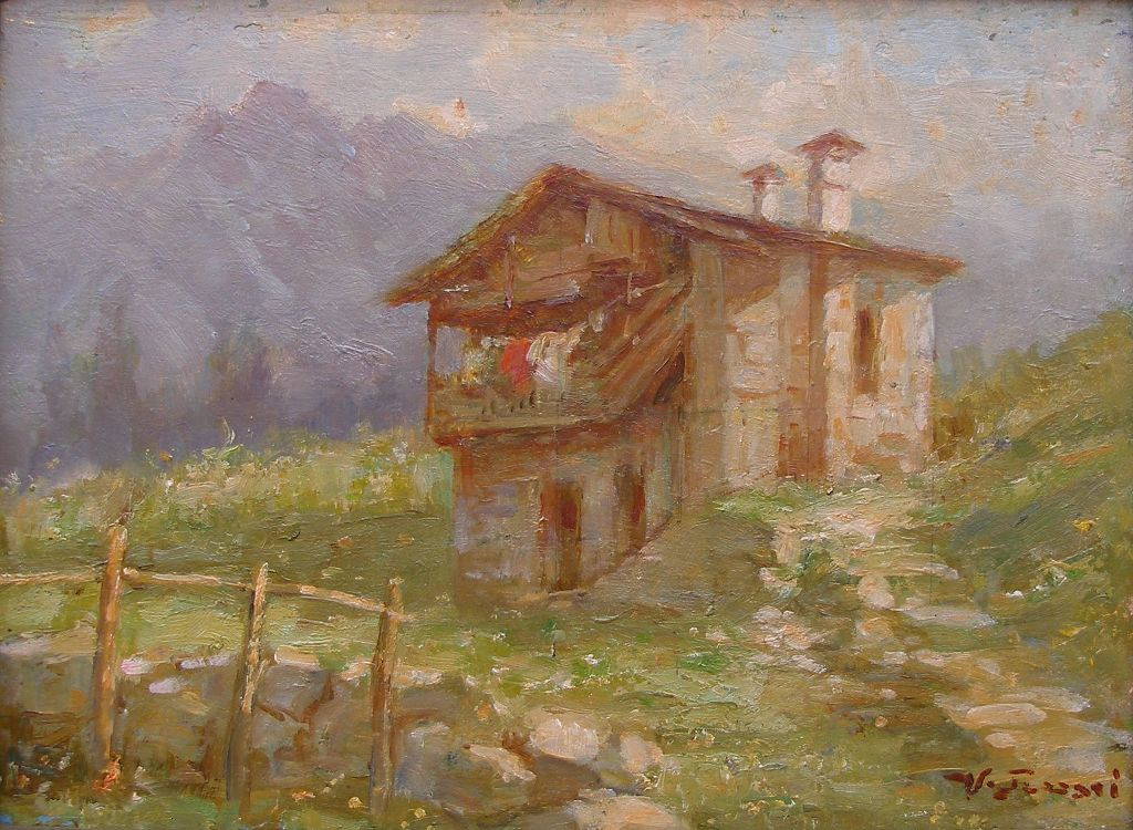 VITTORIO TESSARI (Castelfranco Veneto, 1860 – Mira, 1947), Casolare di montagna, databile alla fine degli anni Trenta – inizi anni Quaranta del XX secolo, olio su tavola, cm. 20,3 x 27,5. Collezione privata. Opera pubblicata in Luigi Cima e l'800 veneziano. Pittura di Terra e di Cielo, catalogo a cura di ANTONELLA ALBAN, Mel (BL), Palazzo delle Contesse, 8 dicembre 2010 – 28 gennaio 2011, Mel 2010.